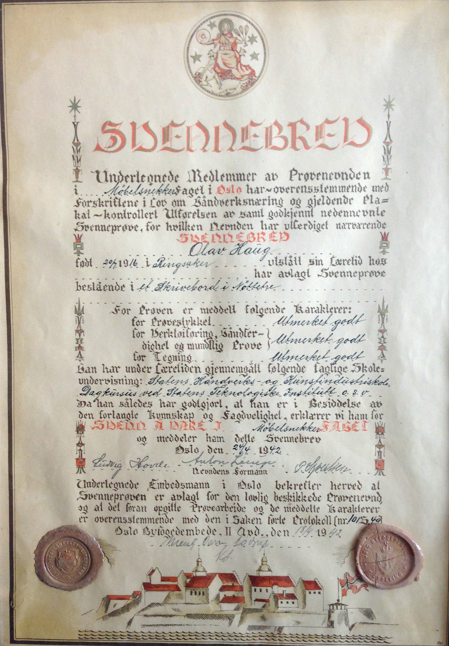 Svennebrev